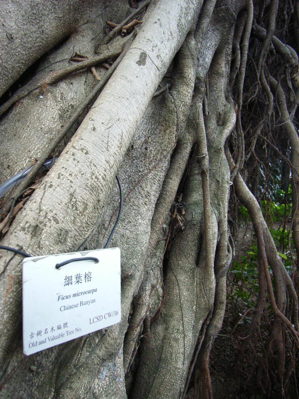 香港zh:上環zh:普仁坊zh:卜公花園, Sheung Wan, Hong Kong